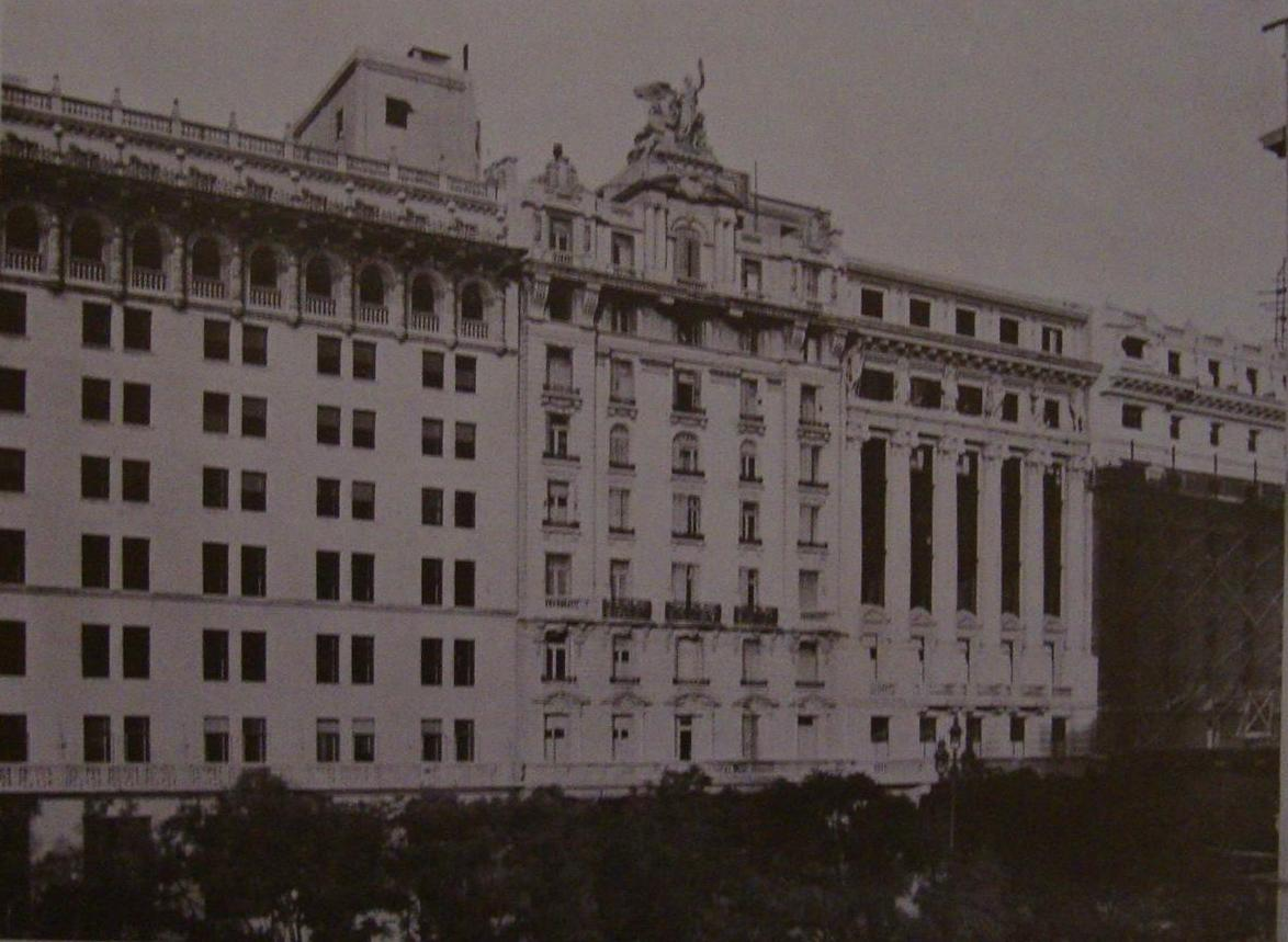 Vista de las fachadas de la primera cuadra edificada de la Avenida Presidente Roque Sáenz Peña (Diagonal Norte) en la ciudad de Buenos Aires. Edificios del First National Bank of Boston (extremo izquierdo) y de las Sociedades Importadora y Exportadora de la Patagonia Ganadera y Comercial - Menéndez Behety (extremo derecho). El edificio del centro actualmente ha perdido la estatua en su coronamiento.